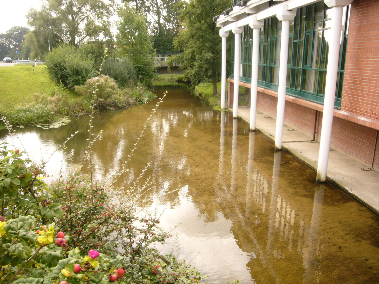 Bach Hehlenriede am Rathaus von Isenbüttel